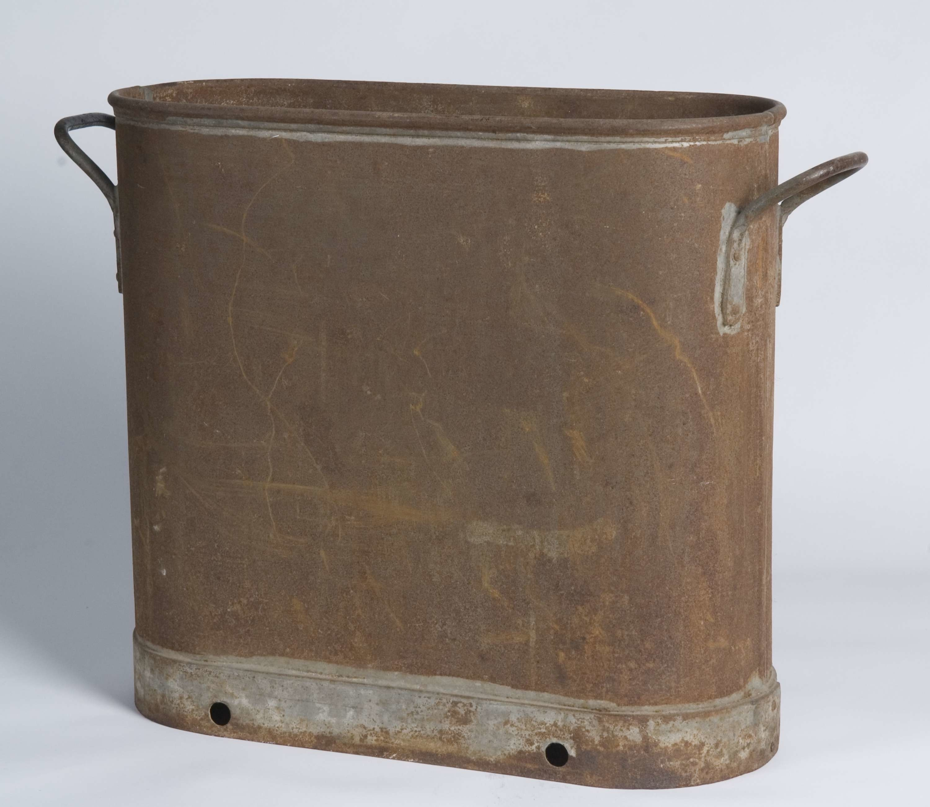 Avkjølingsspann av jern. Spannet har vært forsinket, men har nå bare rester av sink igjen. Spannet har vært brukt i Rakkestad i Østfold. Høyde 43,8 cm. Foto Anne-Lise Reinsfelt / Norsk Folkemuseum, NFL.26765.